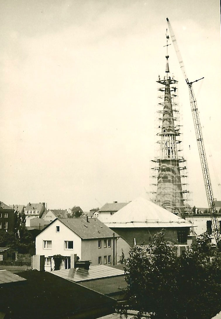 Aufsetzen des Turms der Lukaskirche in Bielefeld, Blick aus einem hinteren Fenster der Huberstraße. Im Hintergrund zu sehen der Bunker in der Weißenburger Straße. Das Gemeindehaus stand zu dieser Zeit noch nicht.